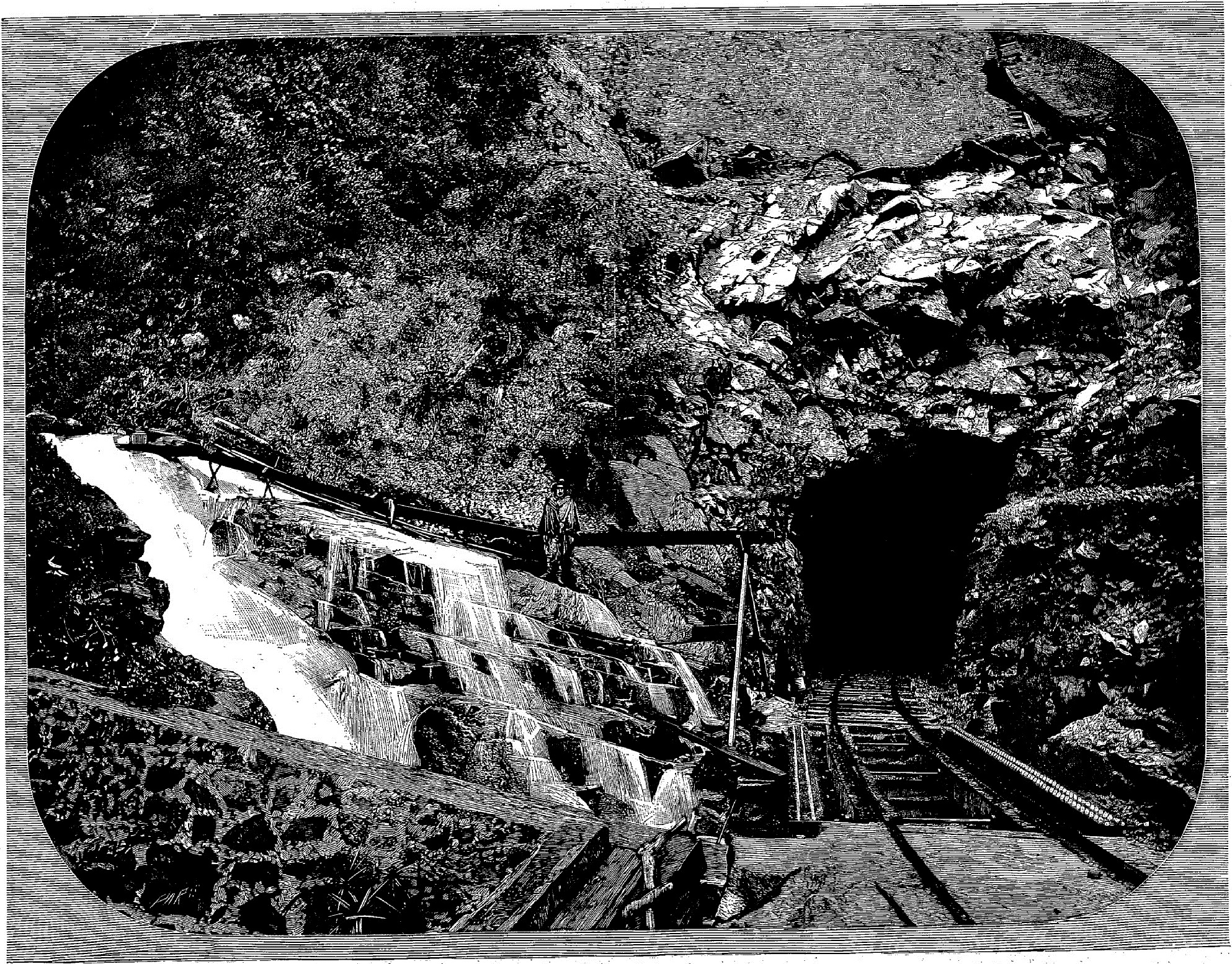 BRÉSIL. — Chemin de fer du Paraná, construit par la Societé anonyme de travaux Dyle et Bacalan (Paris). — Le tunnel de Sanga-Funda.